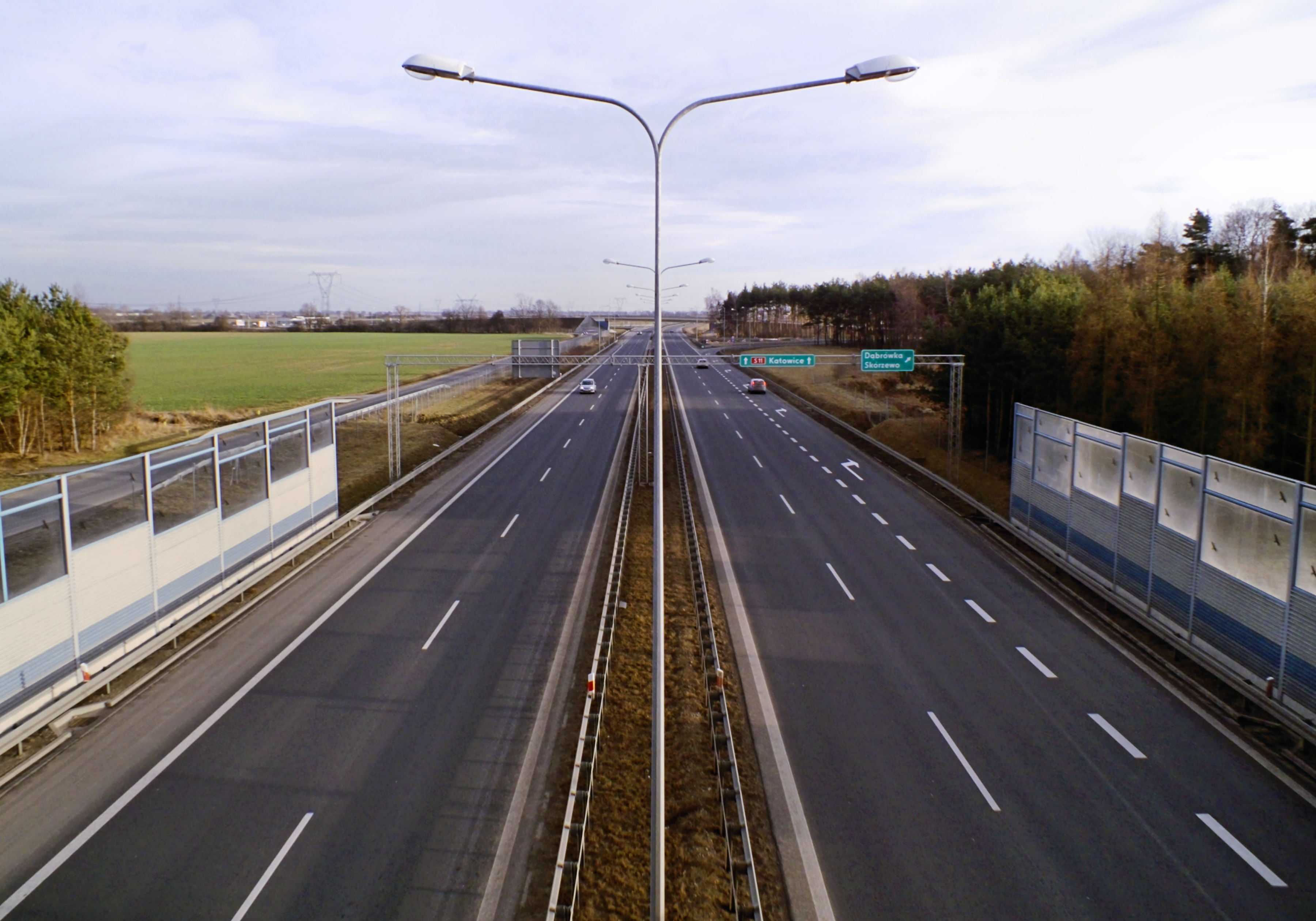 Zachodnia obwodnica Poznania, widok na południe z północnego wiaduktu (jednego z trzech) pomiędzy Dąbrową a Zakrzewem